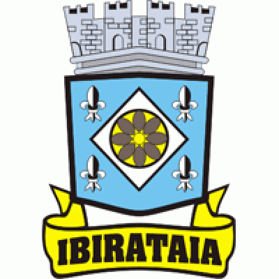 Brasão do Município de Ibirataia